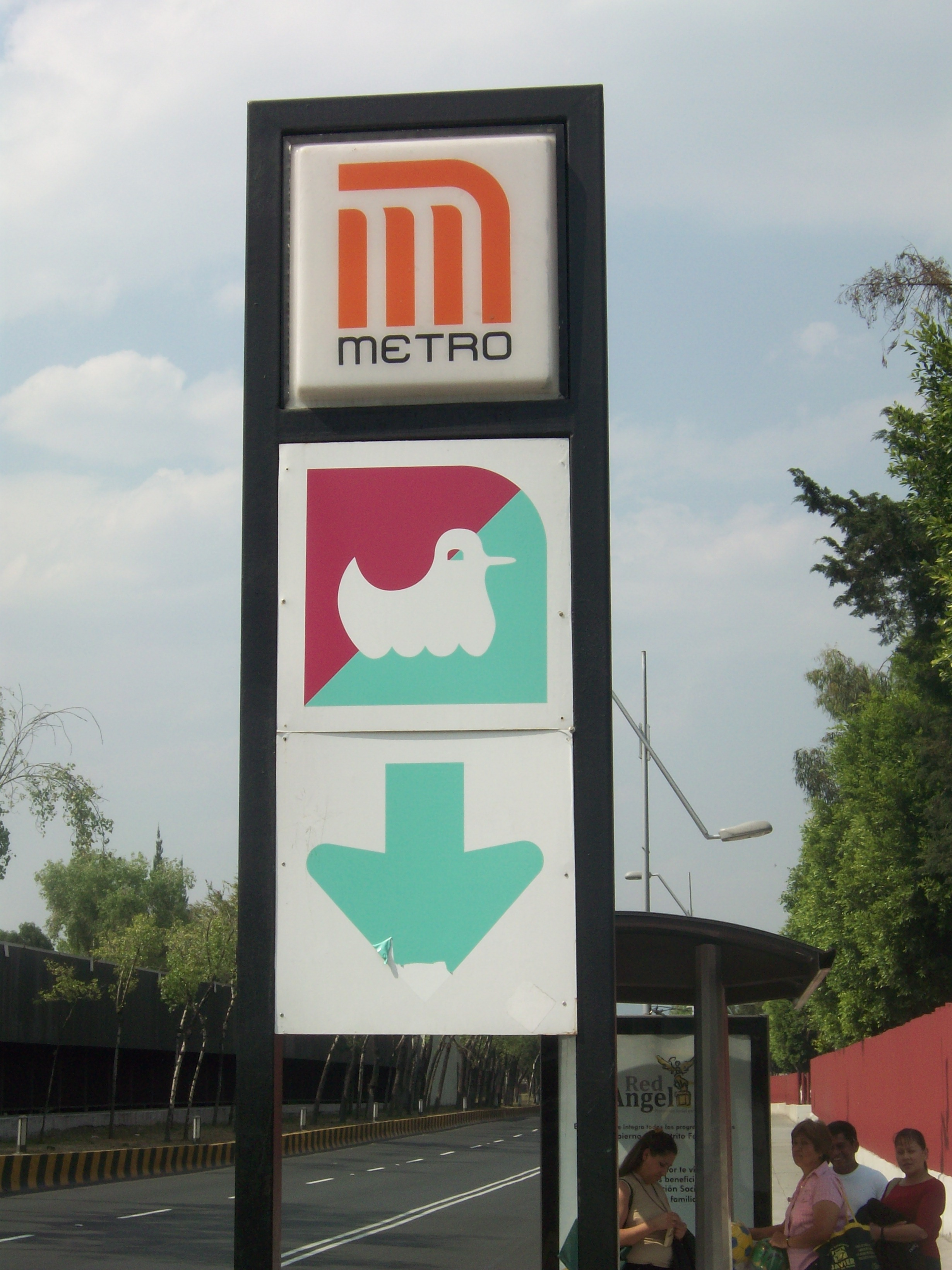 Letrero de la estación Candelaria